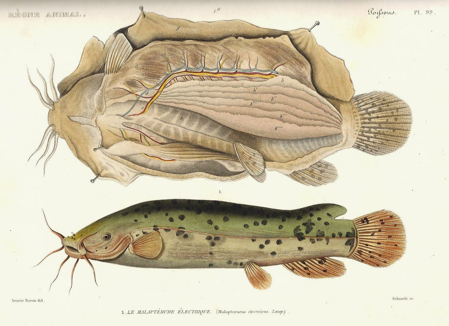 Planche N° 99 du livre "Le règne animal distribué d'après son organisation" par Georges Cuvier (Tome 8), seconde édition de 1828, représentant Malapterus electricus.